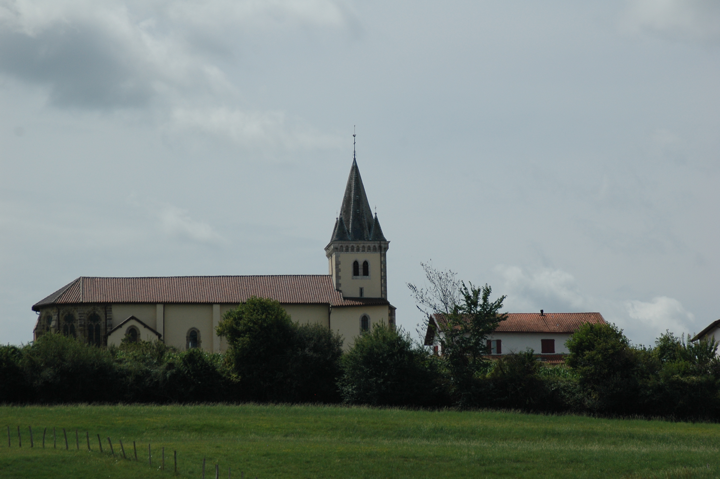 L'église Saint-Félix de Garris